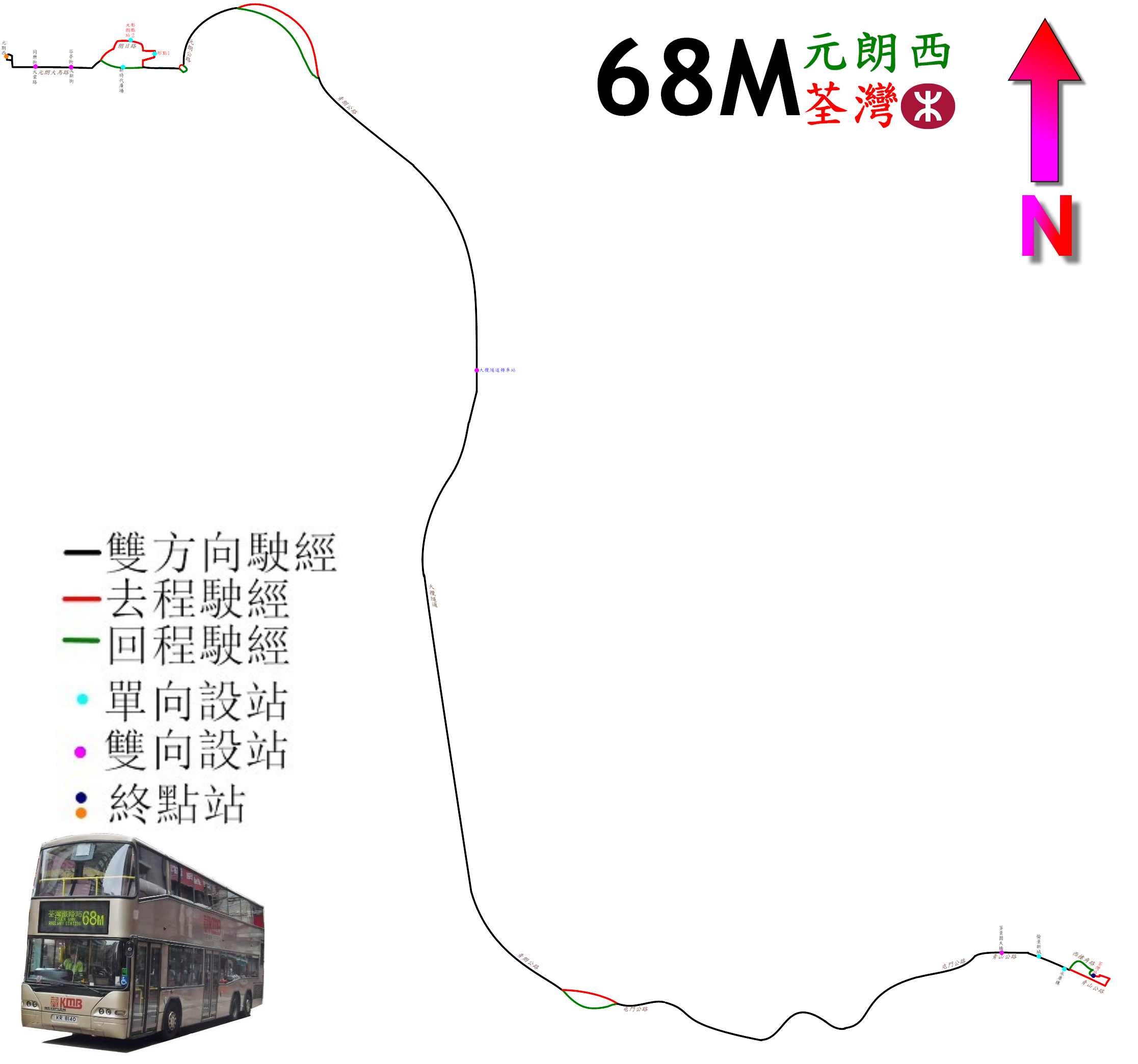 中文（香港）: 九巴68M線的走線圖